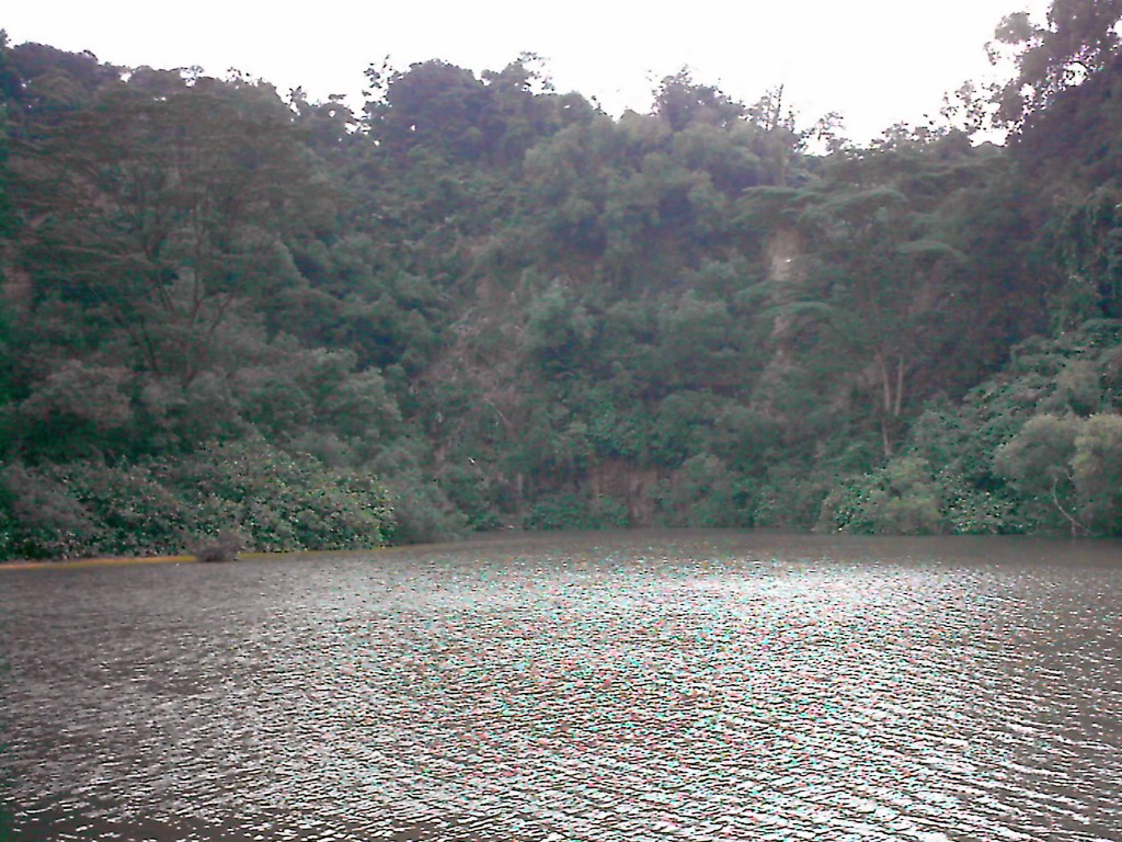 香港九龍塘筆架山的「小西湖 Siu Sai Wu」的其中一個貯水池，它是英國政府建築的貯水池，約拍攝於公元1996年的夏季。